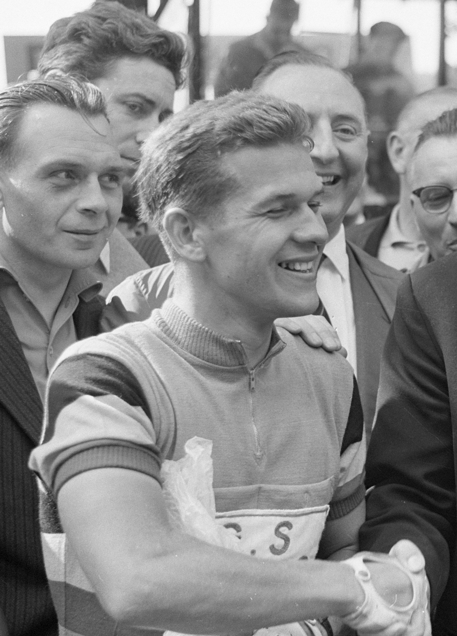 Daems en Lefevre. Tour de France 1961